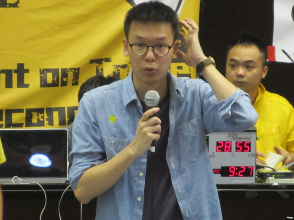 反兩岸服貿協議學生領袖林飛帆。